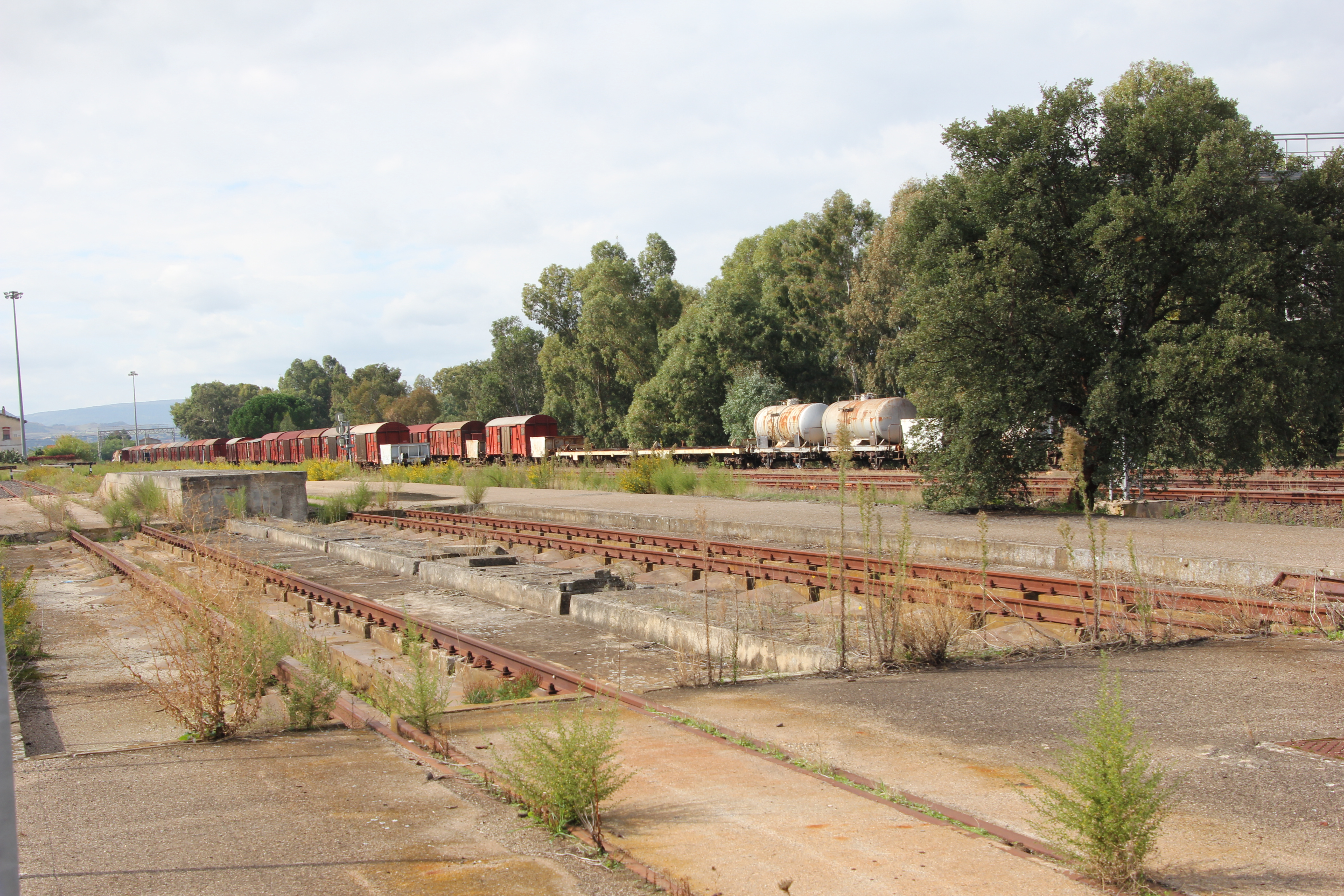 Ozieri - Stazione ferroviaria di Chilivani